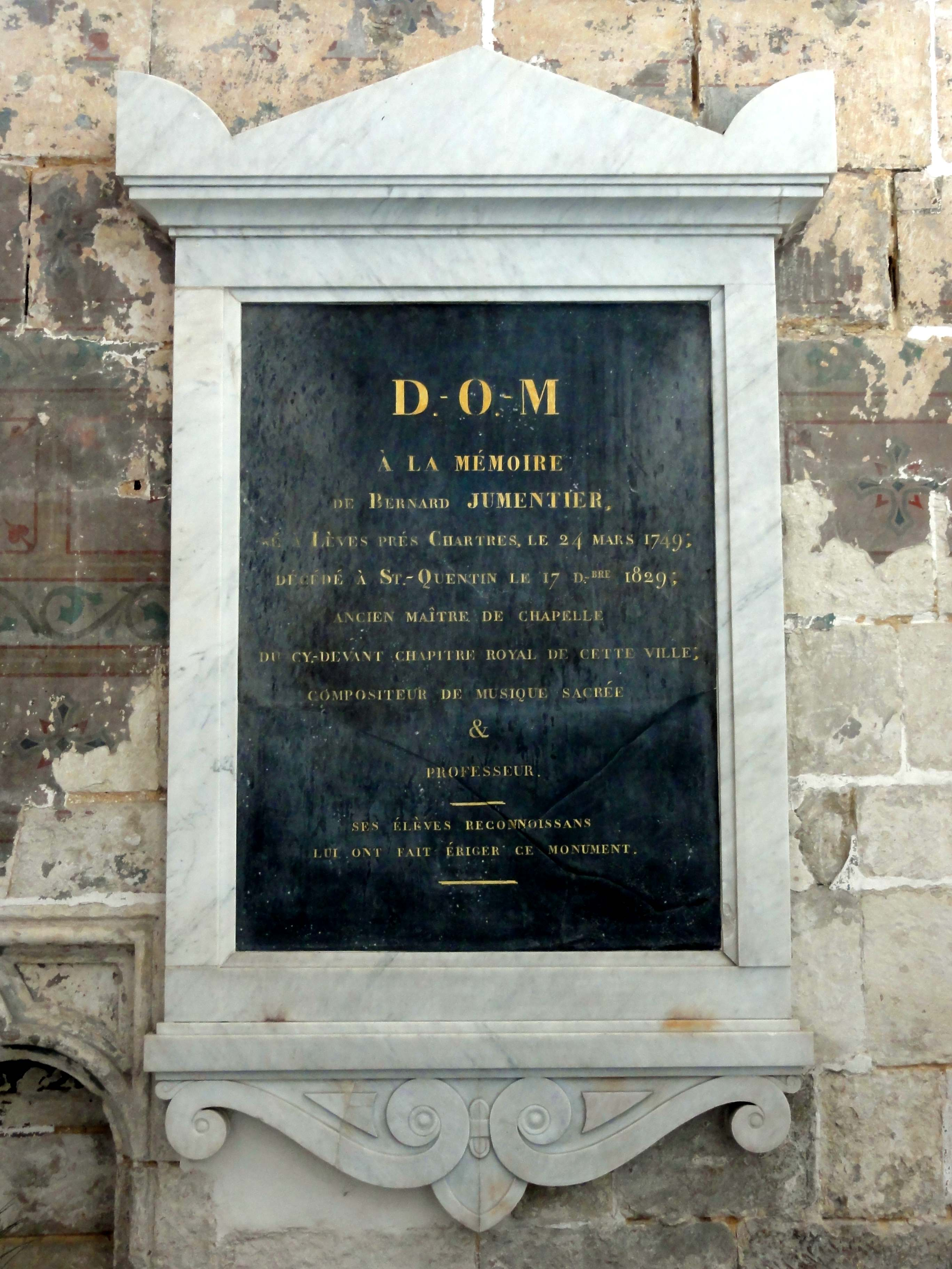 Mobilier de la basilique Saint-Quentin - voir le titre du fichier.